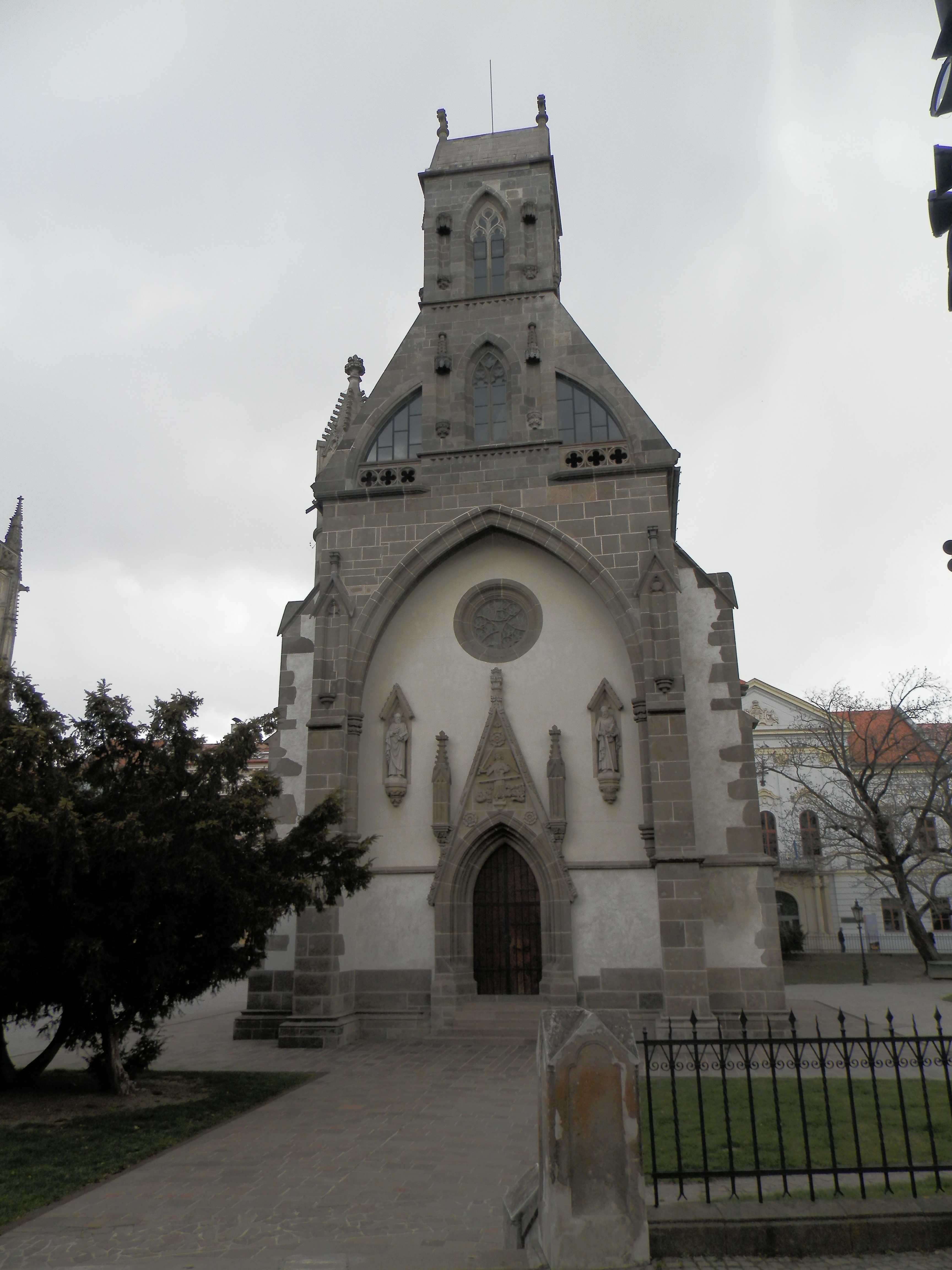 Priečelie Kaplnky sv. Michala v Košiciach. Víťazný oblúk s tympanonom s vyobrazením sv. Michala.